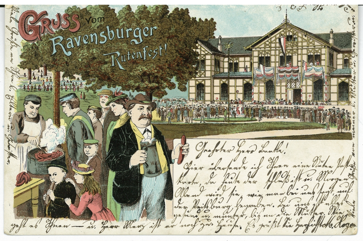 Ansichtskarte vom Rutenfest Ravensburg (mit der alten Kuppelnauturnhalle)